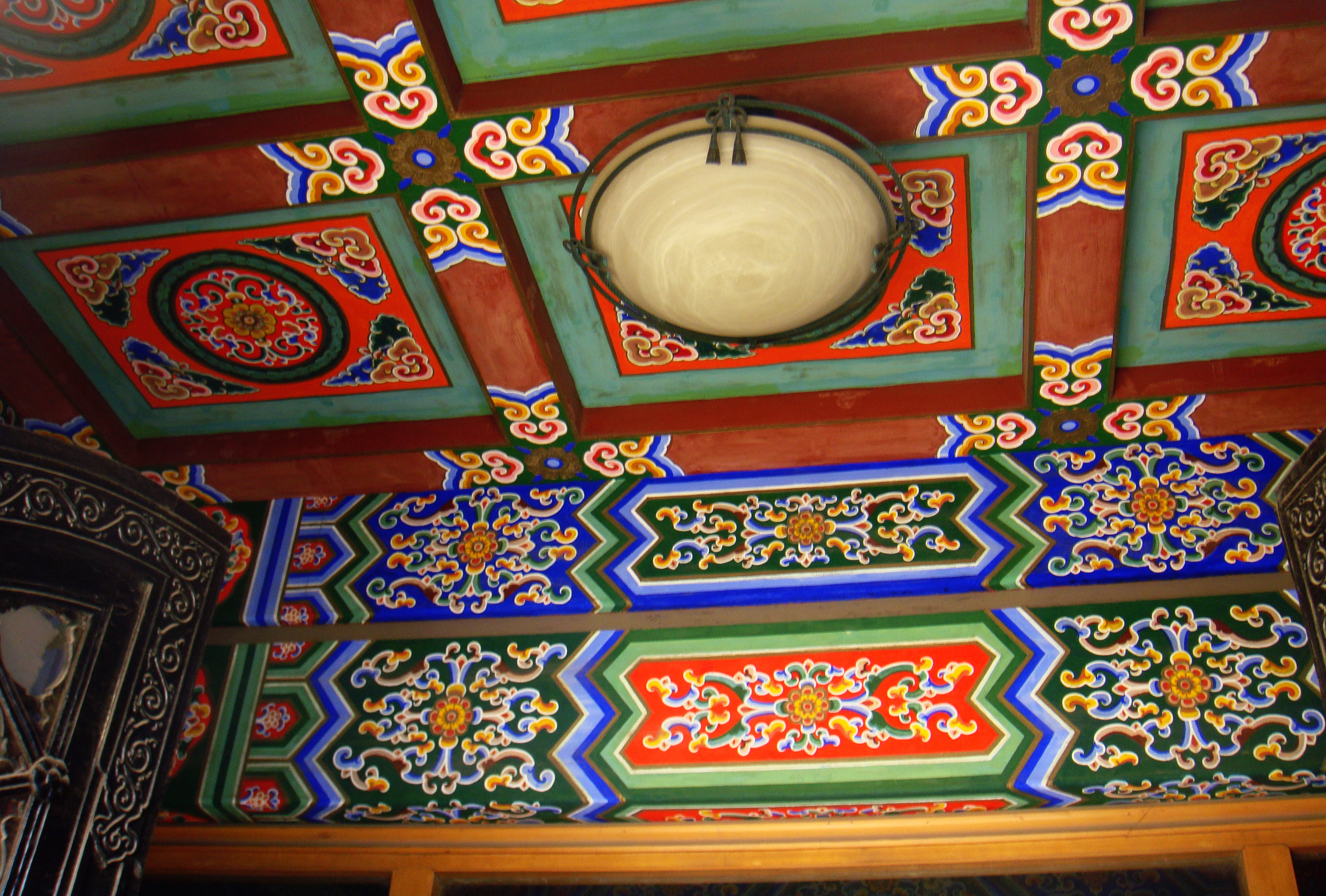 上海市立博物馆门厅天顶的彩画和藻井